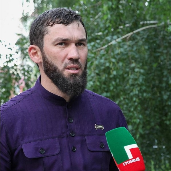 Даудов М.Х. даёт интервью местному телевидению ЧГТРК "Грозный"